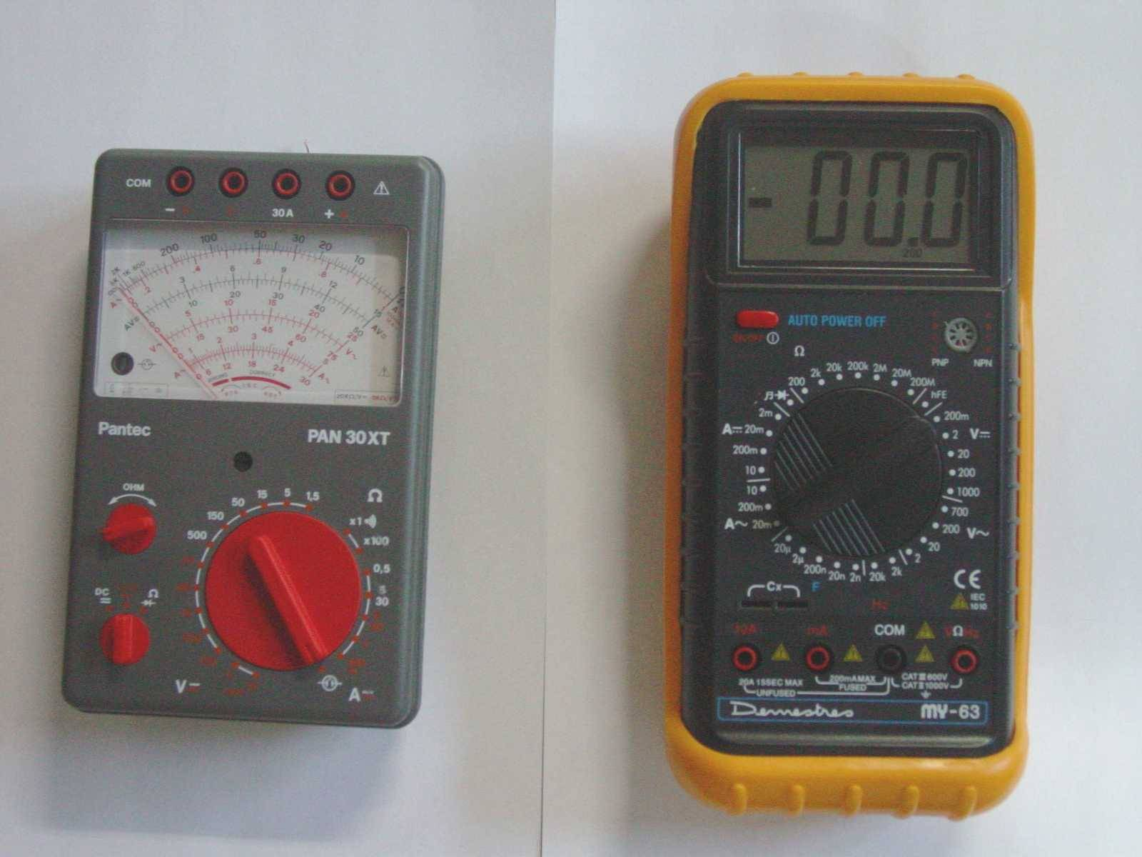 Polimetro analógico y digital